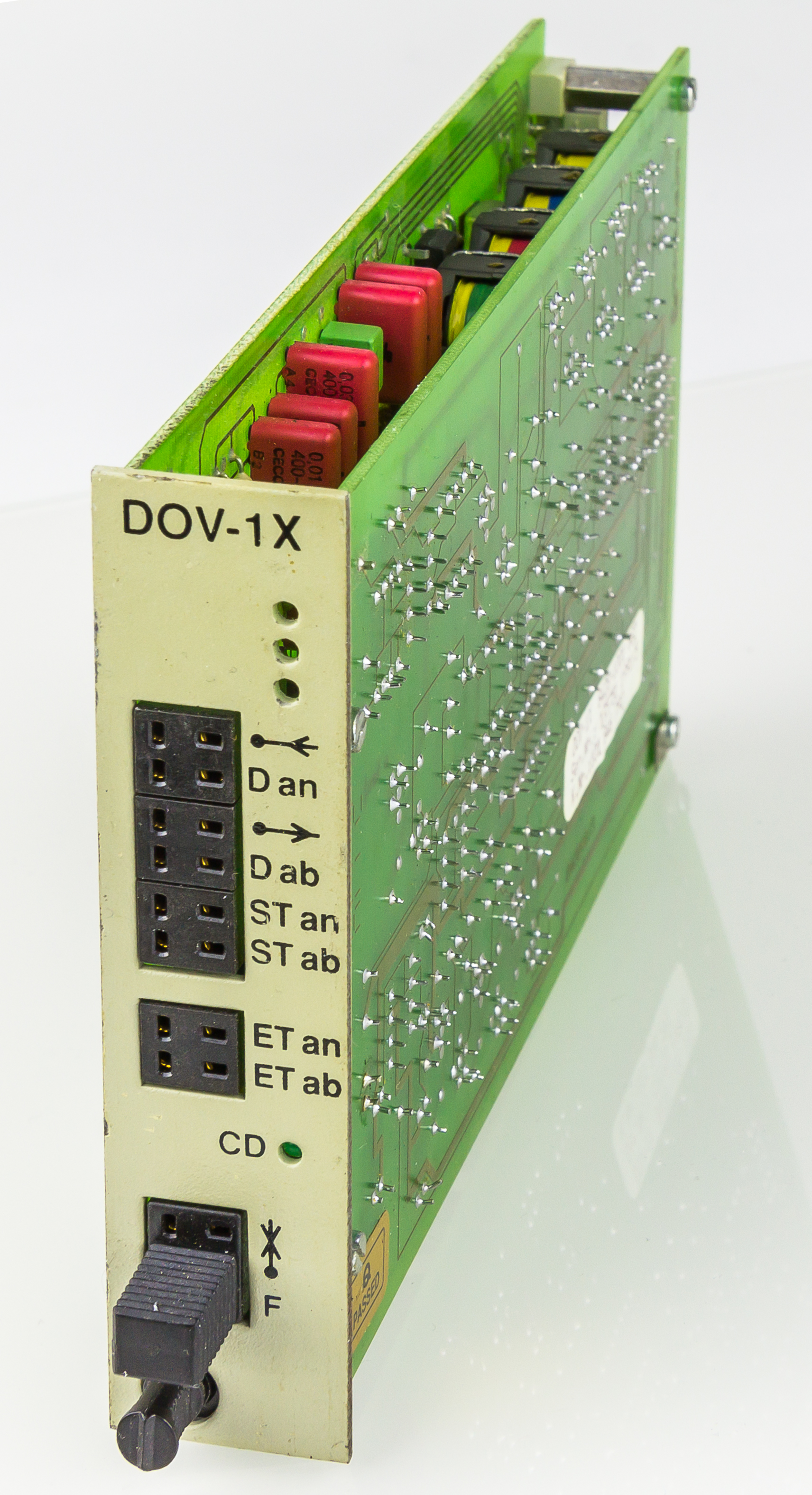 DOV-1X Steckkarte. Diese Karte wurde in der Vermittlungsstelle in Gestellrahmen eingesetzt. Die Gegenstelle beim Teilnehmer war ein Stand-alone-Gerät. Hersteller war die Firma „Datentechnik GmbH“ aus Wien/Österreich Erklärung der Beschriftung: an/ab Richtungshinweis ankommend/abgehend D Daten ST Sendetakt ET Empfangstakt CD Carier detect (Verbindung zur Gegenstelle besteht) F Fern(Anschluss)leitung